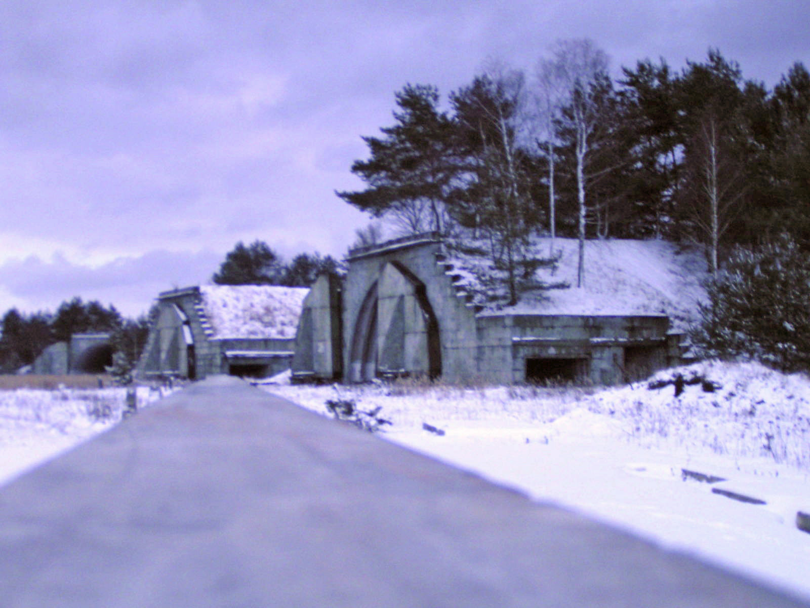 Noční pohled na letiště Hradčany, okres Česká Lípa, Czech Republic Jiří Vackář 20:23, 15 May 2006 (UTC)